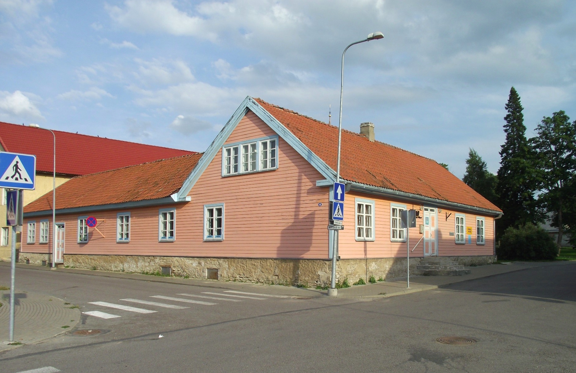 Paide, Väike-Aia 13